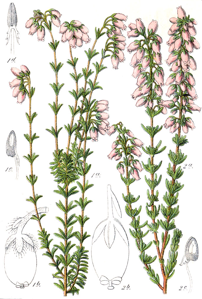 1. Erica tetralix L. 2. Erica cinerea L. Original Caption 1. Glockenheide, Erica tetralix 2. Graue Heide, E. cinerea